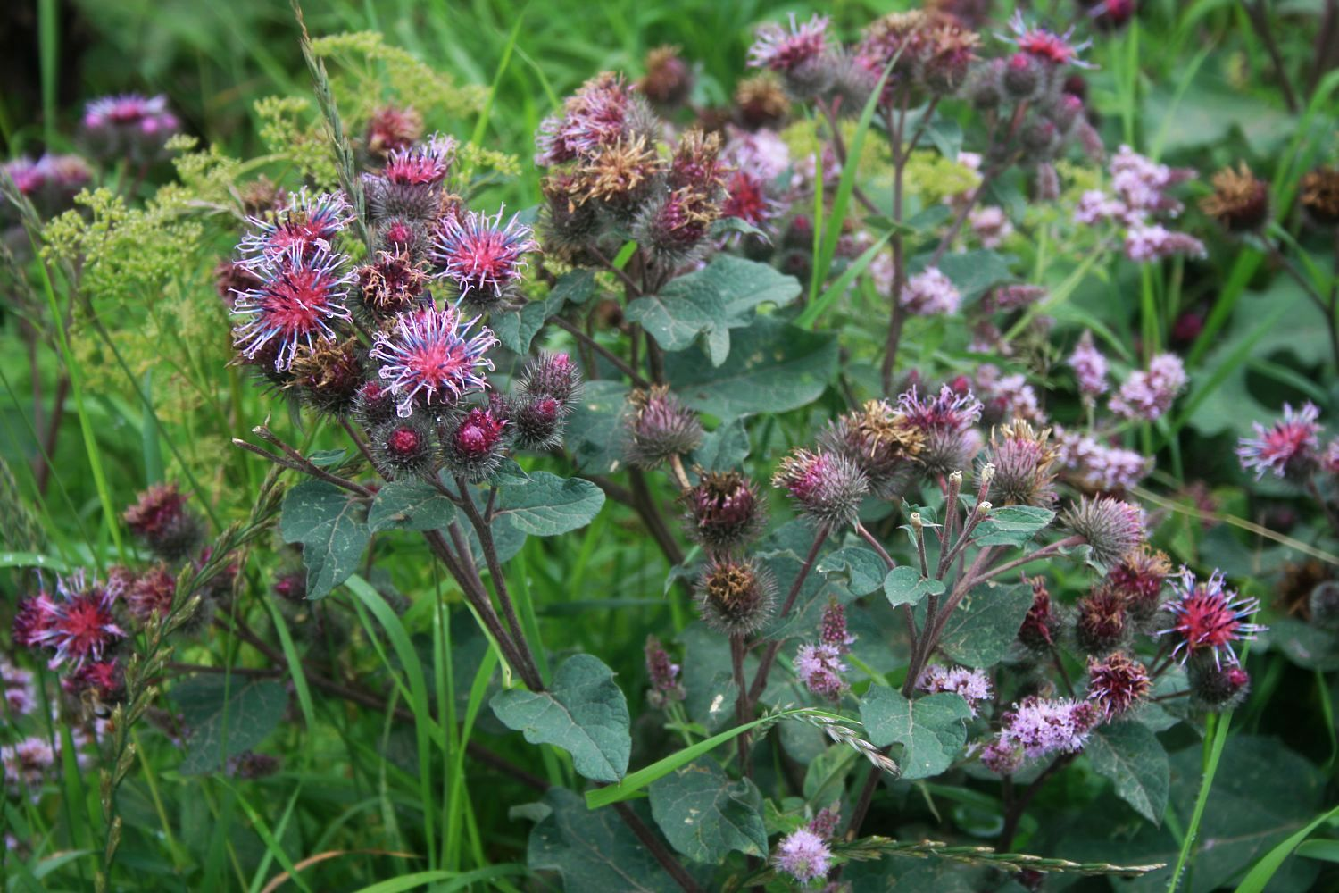 Arctium palladinii, Korbblütler (Asteraceae) – Georgien/საქართველო: Kleiner Kaukasus, Bakuriani/ბაკურიანი, ca. 1720 m s.m.